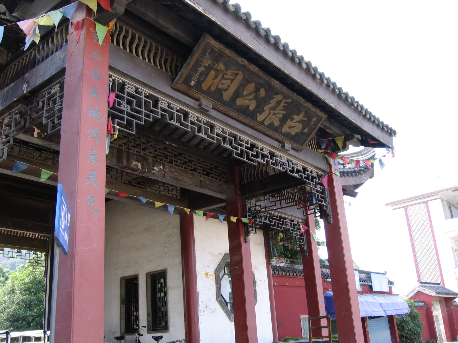 宜兴张公洞 Zhanggong Cave, Yixing, China